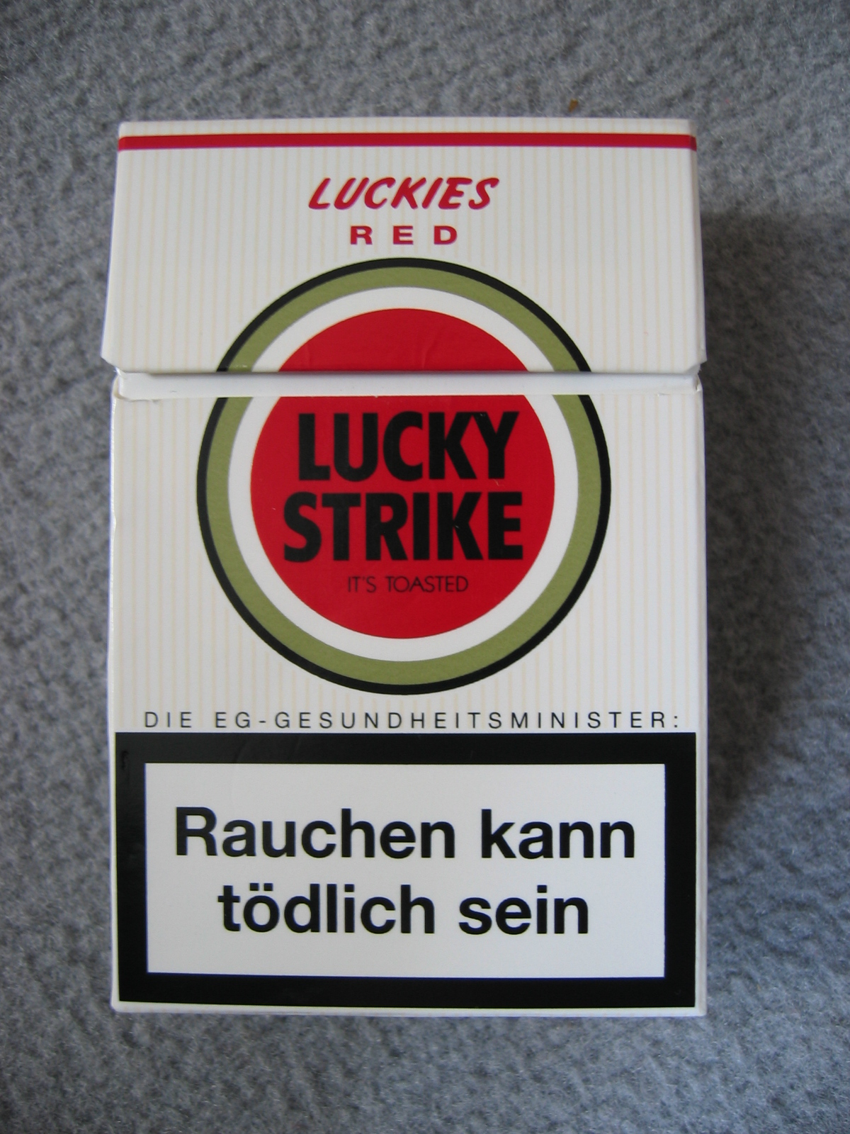 Lucky Strike Zigarettenschachtel